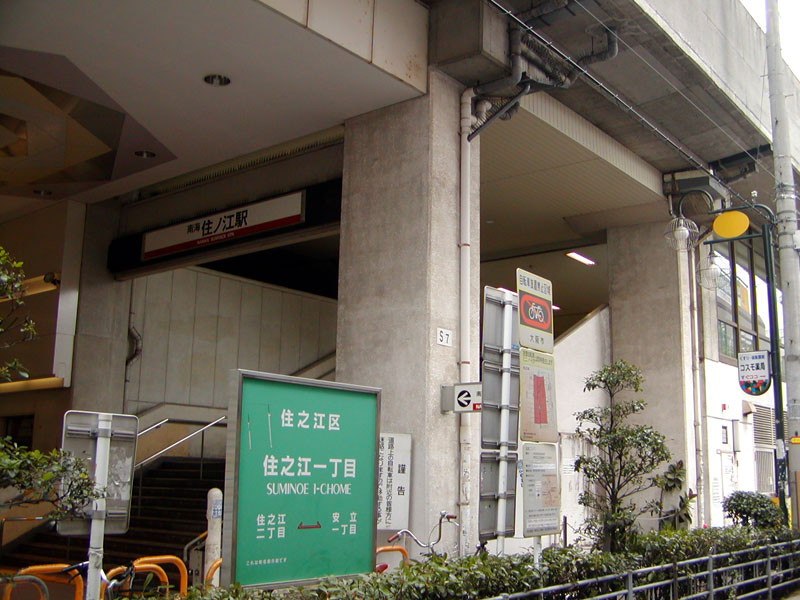 南海本線 住ノ江駅（大阪市住之江区西住之江1丁目1番41号）